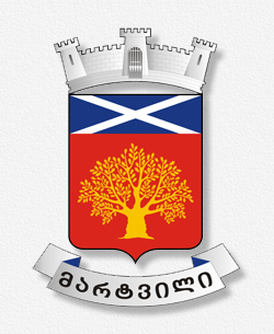 მარტვილის მუნიციპალიტეტის გერბი